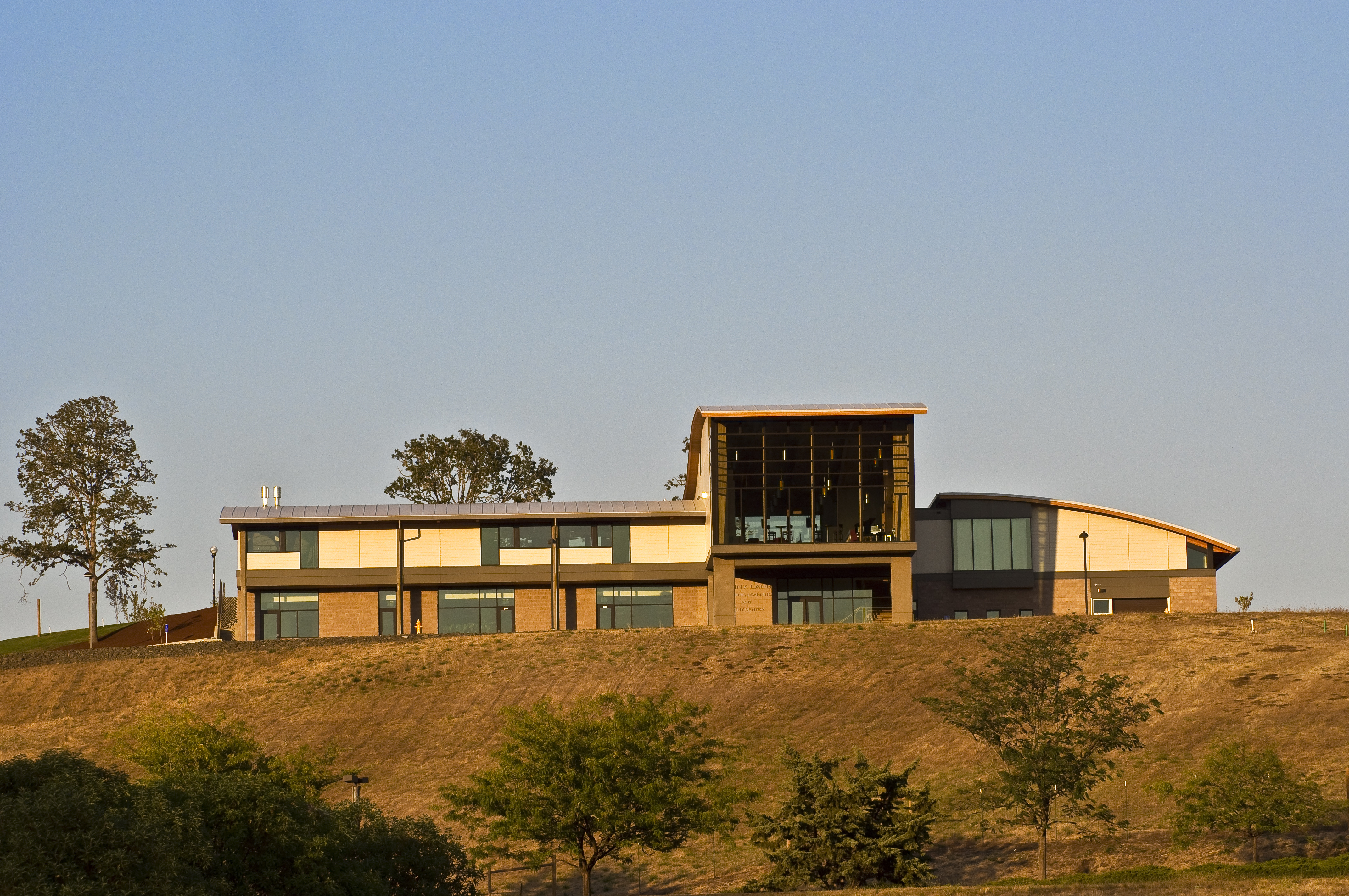 1 B